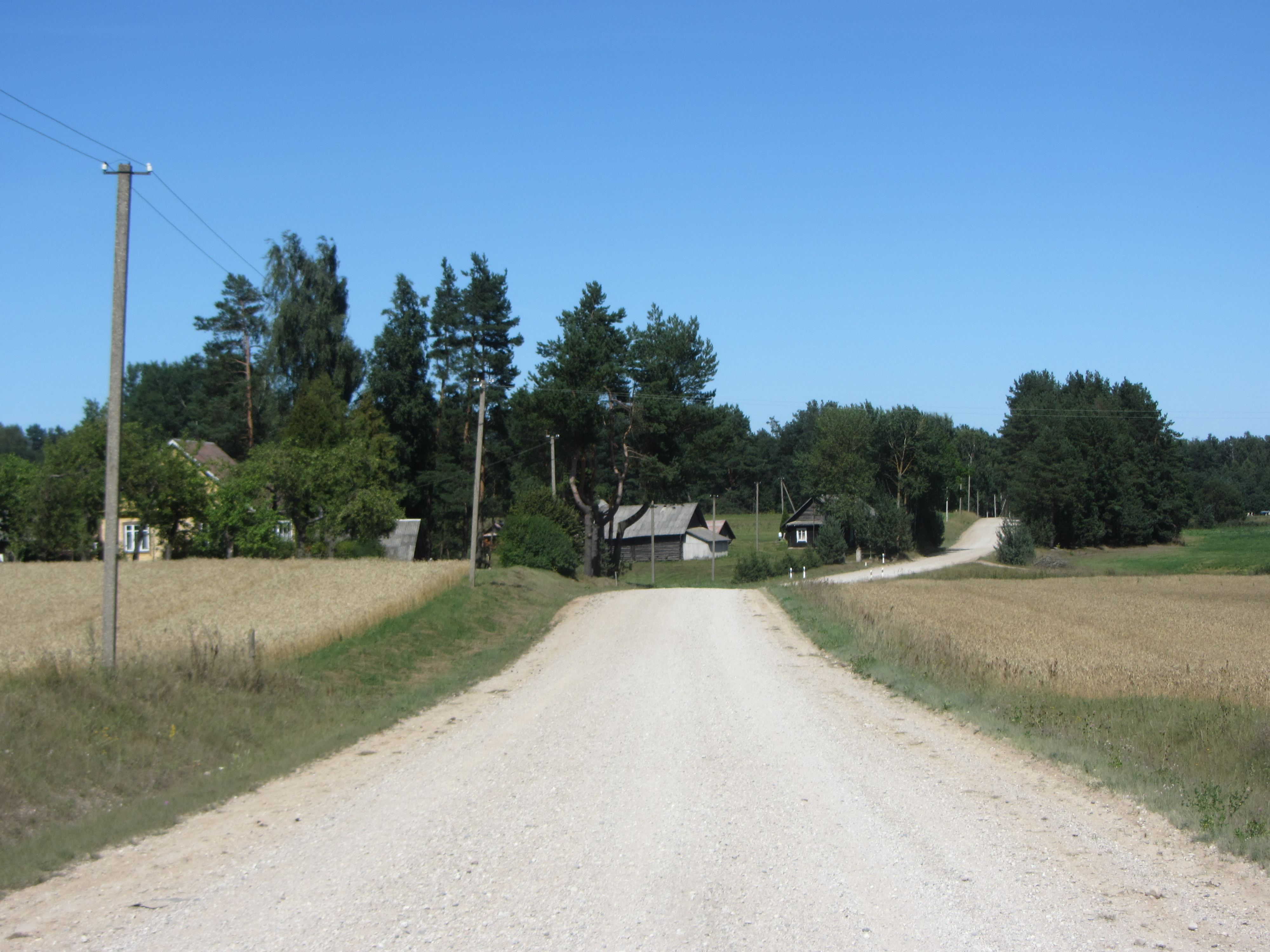 Užpalių sen., Lithuania